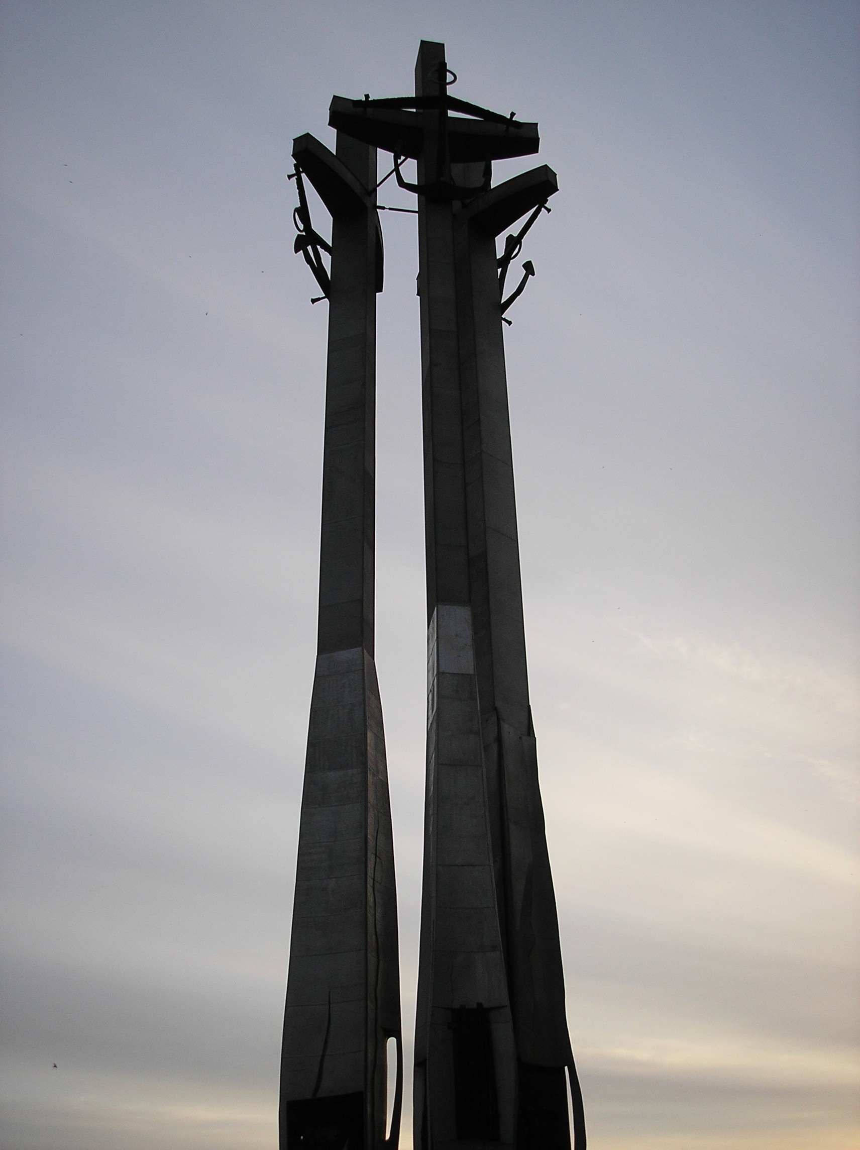 Monumento a los caidos en las revueltas de 1970 frente a los a los Astilleros de Gdansk. Polonia, verano 2005.